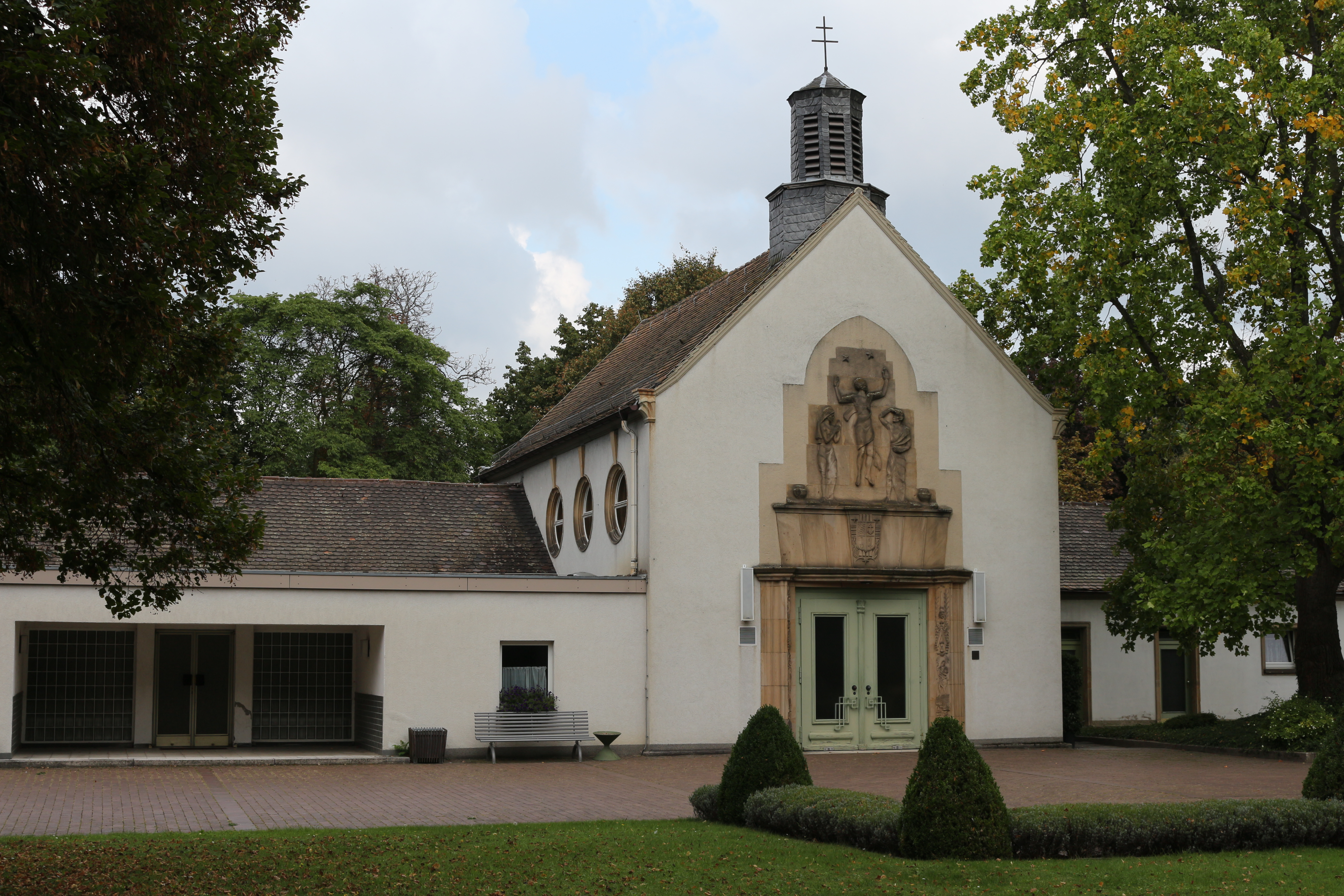 Friedhofskapelle auf dem Friesenheimer Friedhof in Ludwigshafen-Friesenheim, Kopernikusstraße 55; erbaut 1926-1927; unter Denkmalschutz